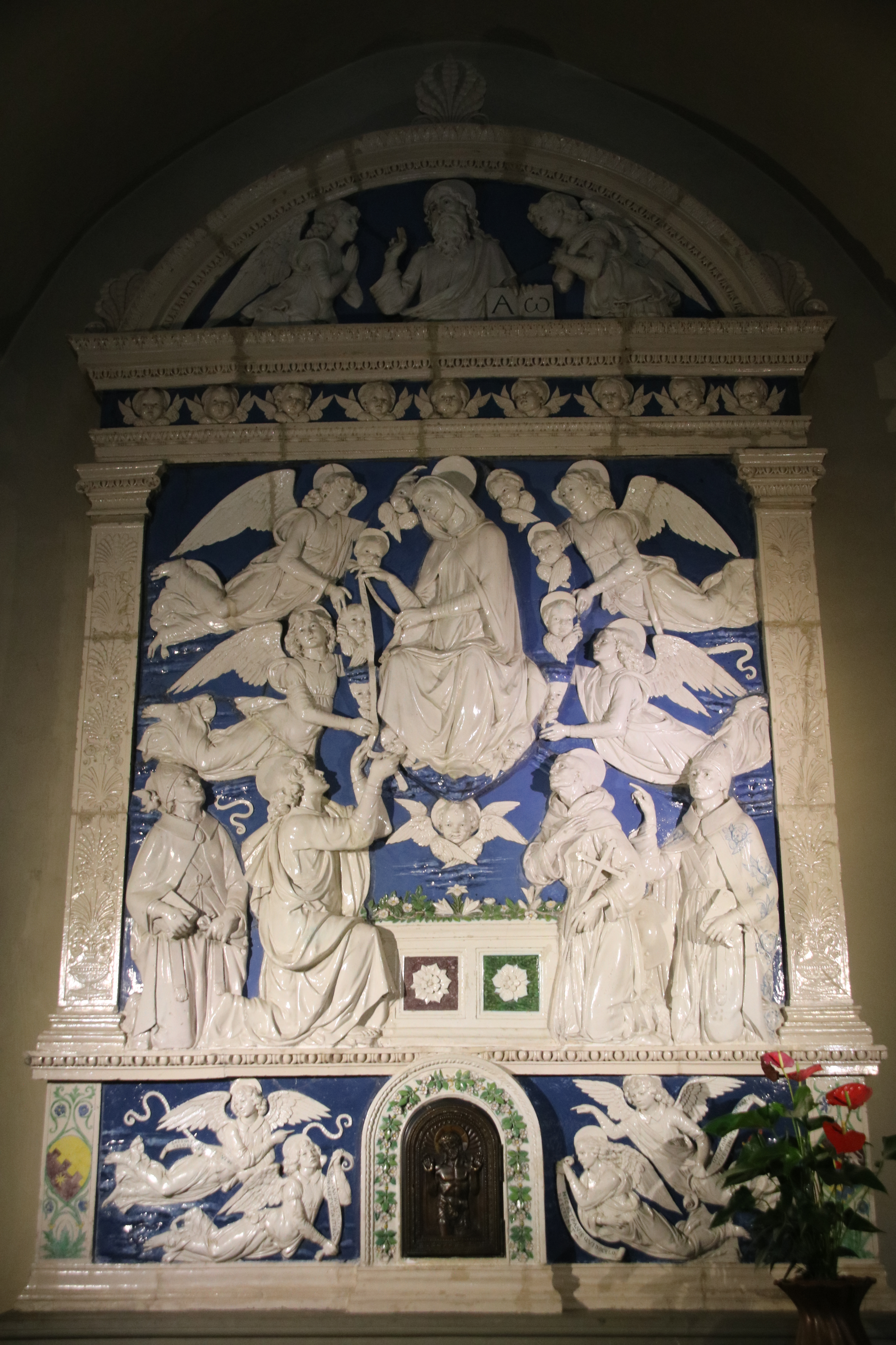 Andrea della Robbia, La Madonna Assunta dona la cintola a San Tommaso tra i Santi Gregorio, Francesco e Bonaventura, 1488 circa, chiesa di Santa Maria degli Angeli (La Verna)